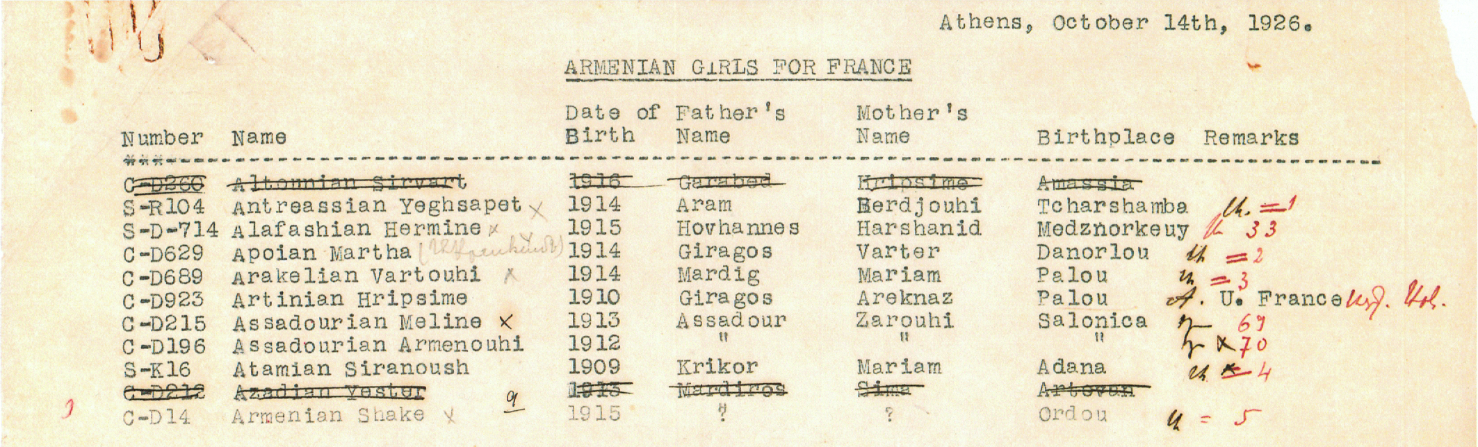 Liste d'orphelines envoyées à l'école Tebrotzassère par le Near East Relief, dont Mélinée Assadourian (plus tard connue pour ses activités dans la résistance intérieure française et pour avoir été l'épouse du résistant Missak Manouchian) et sa sœur Armenouhi Assadourian aux lignes 7 et 8.